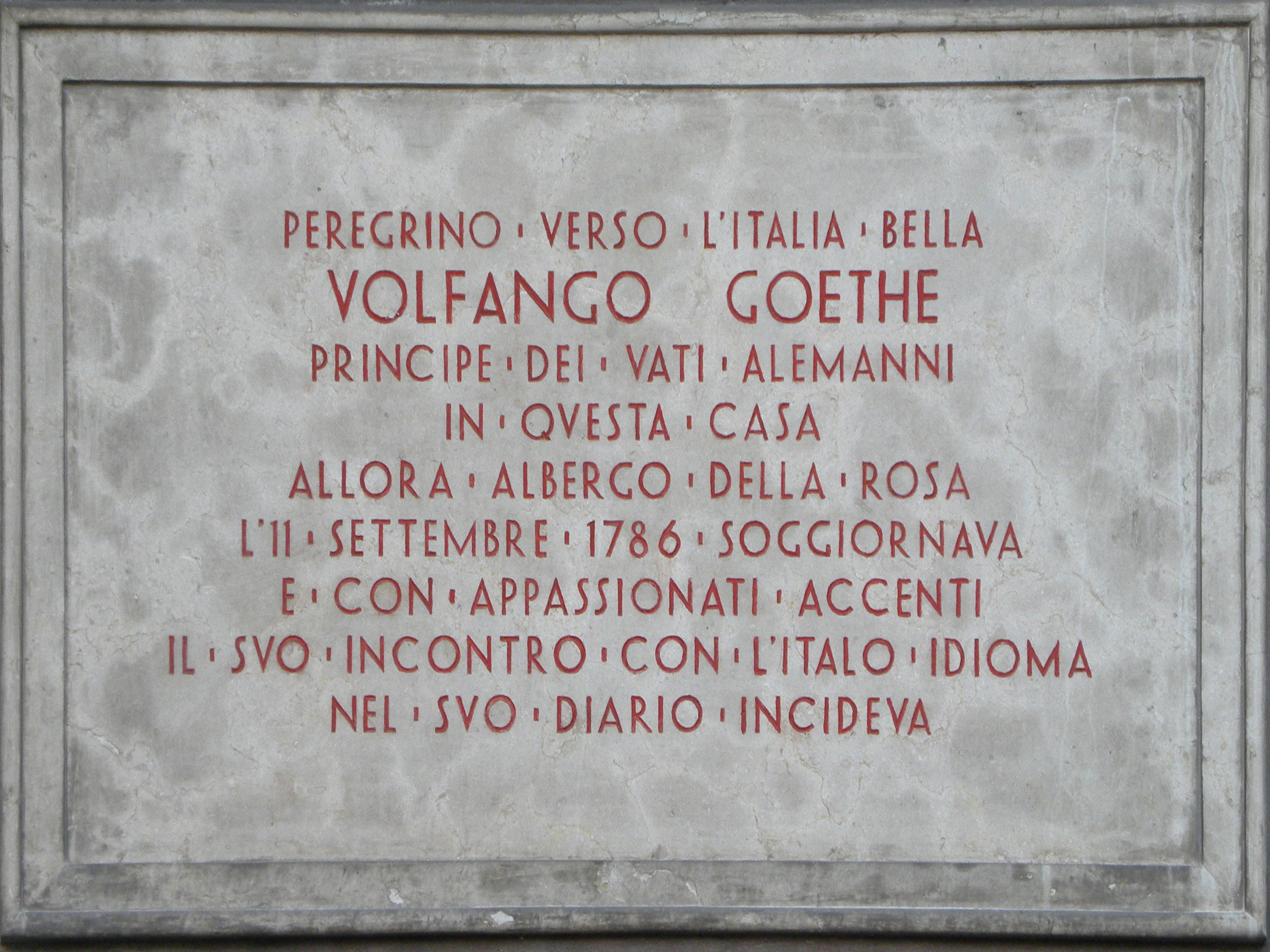 La lapide si trova in Corso Bettini sul palazzo (molto rimaneggiato) sulla destra della strettoia provenendo dalla piazza, l'antico Albergo "Alla rosa", dove sostarono ospiti ragguardevoli, tra cui anche Goethe e Mozart. Nel 1786 Goethe, a 37 anni, intraprese il suo primo viaggio in Italia, durato quasi due anni, e visitò anche il Trentino: arrivò a Trento il 10 settembre e poi continuò il suo viaggio verso Rovereto e Torbole. Nel suo diario di viaggio, pubblicato ne 1829, si trova scritto: "Eccomi a Rovereto, punto divisorio della lingua; più a nord si oscilla ancora fra il tedesco e l'italiano. Qui per la prima volta ho trovato un postiglione italiano autentico; il locandiere non parla tedesco, e io devo porre alla prova le mie capacità linguistiche. Come sono contento che questa lingua amata diventi ormai la lingua viva, la lingua dell'uso!"